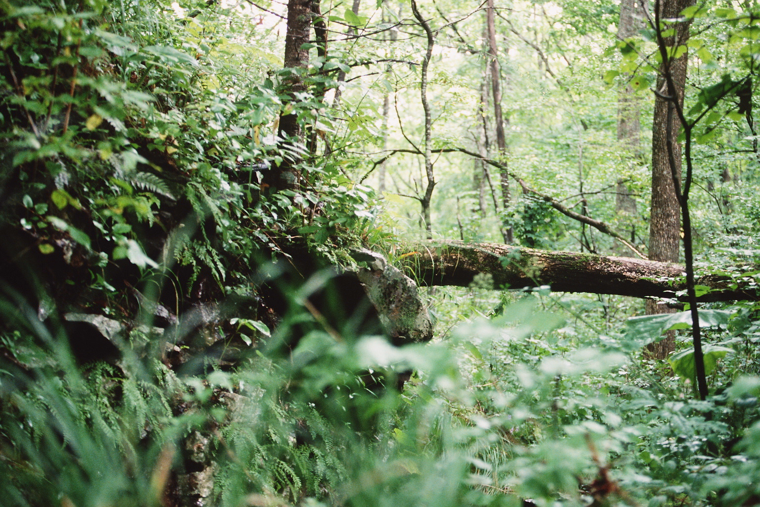 Zapovednik Kedrovaya Pad, Ferner Osten Russlands